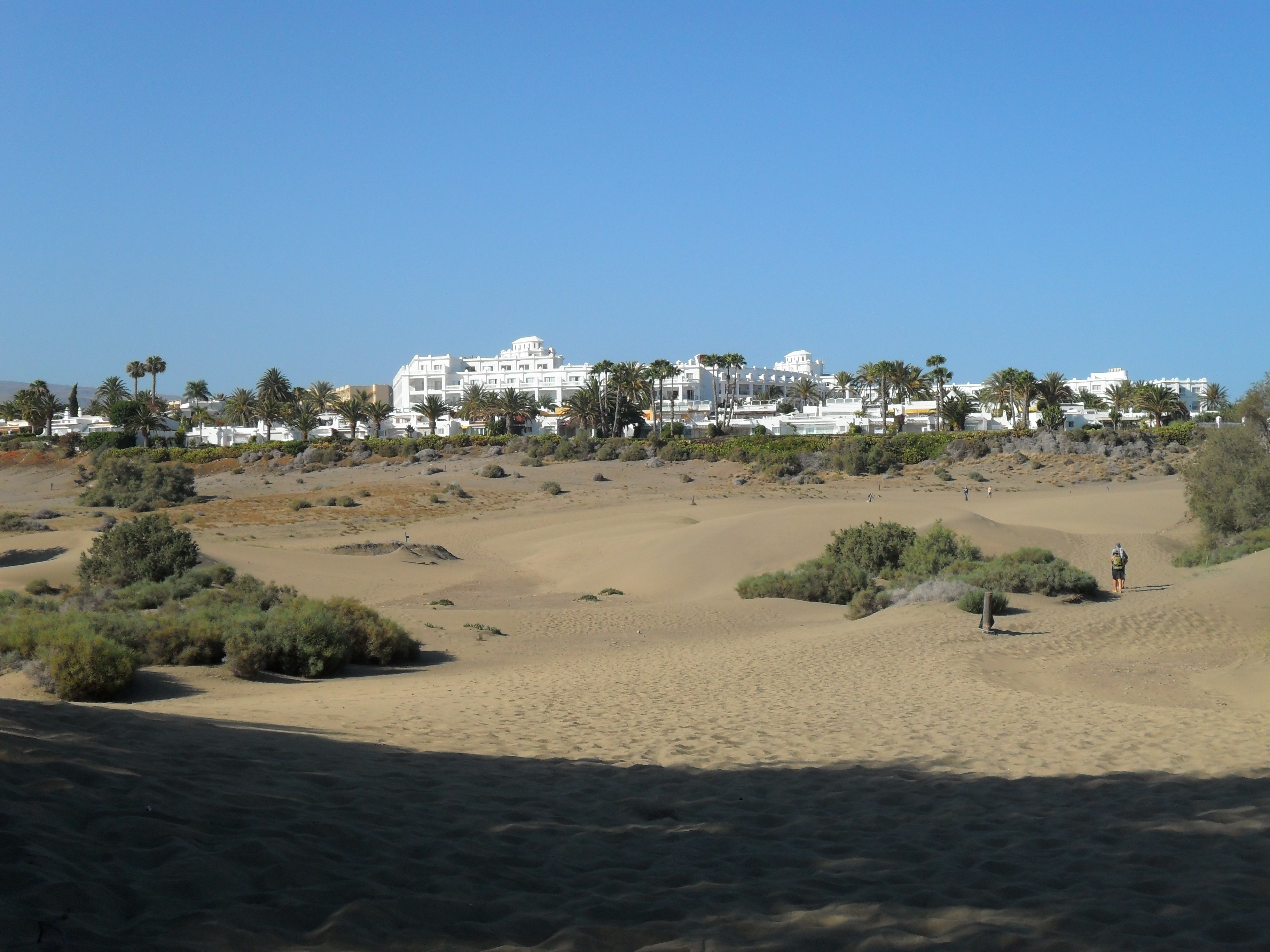 Dune di maspalomas